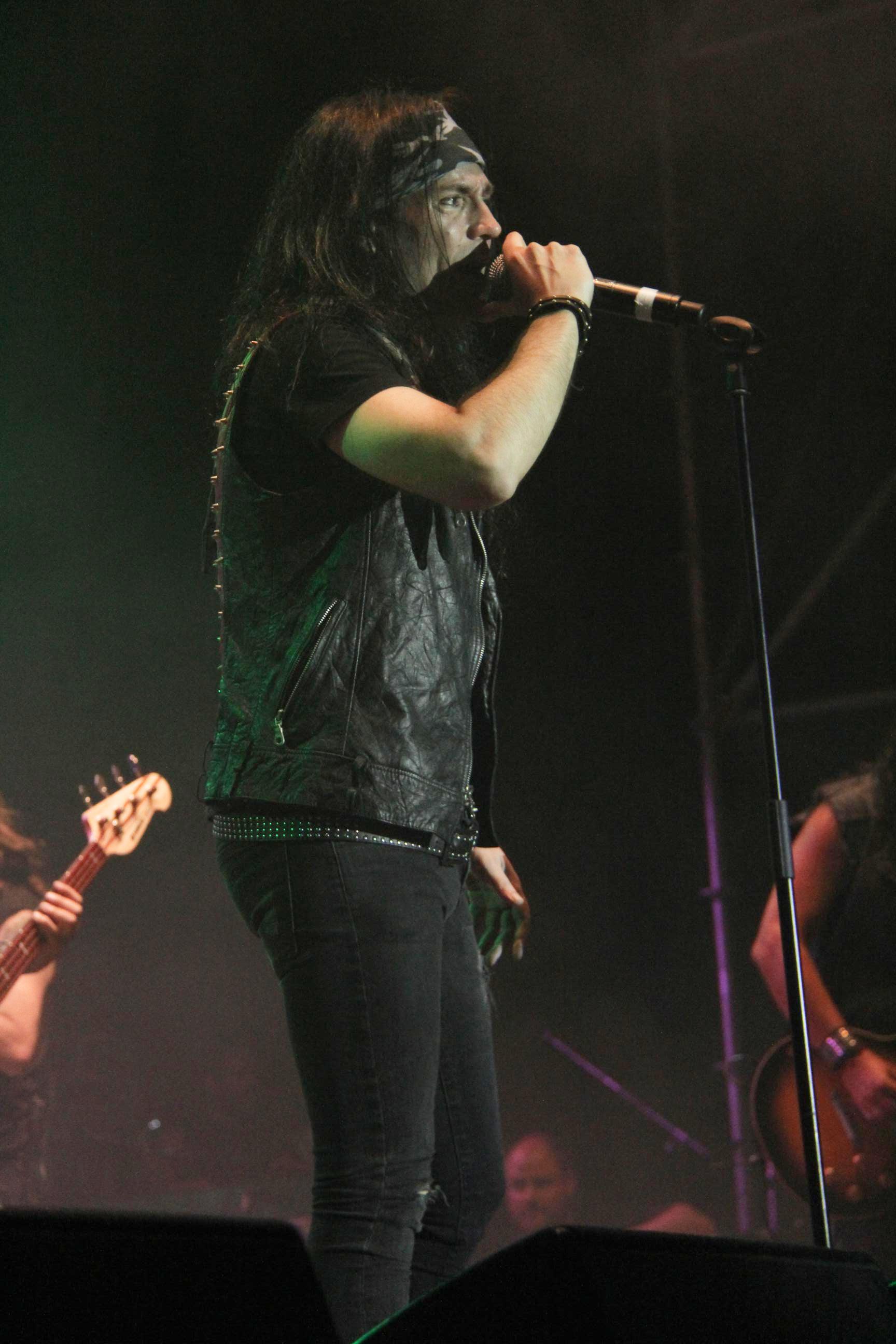 Zeta en un concierto de Mägo de Oz (6).